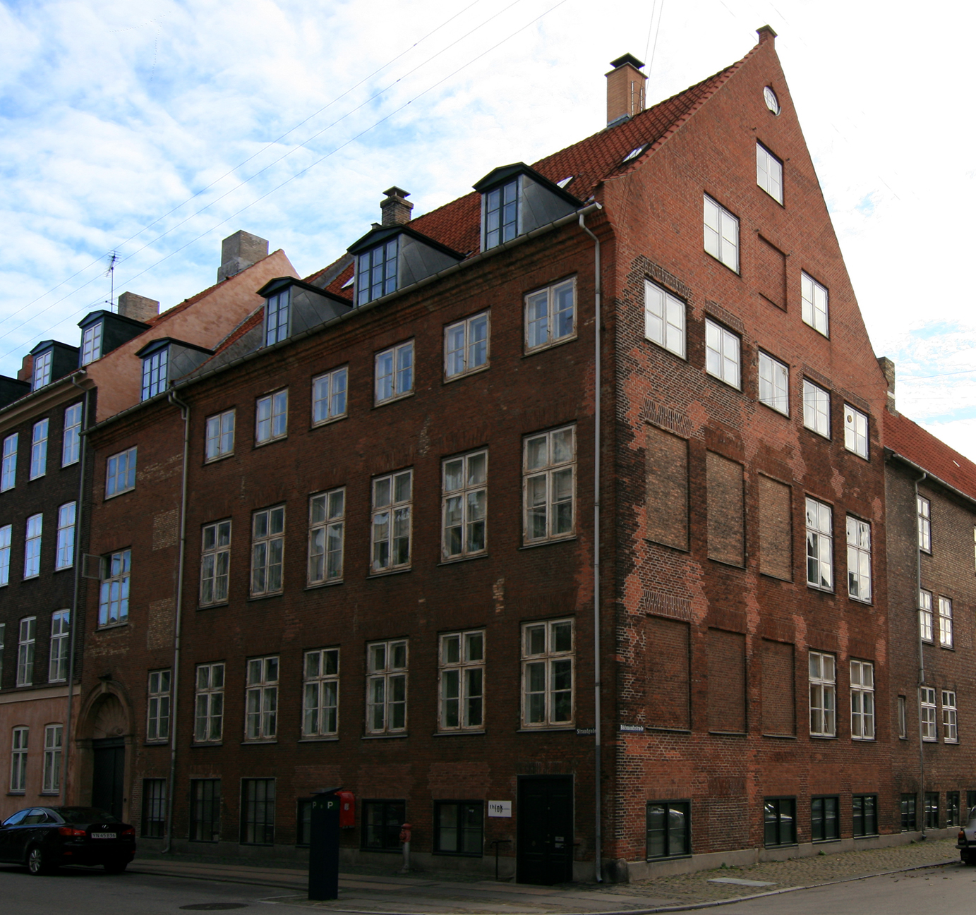 Andreas Bjørns Gård, Strandgade 46, København. Bygget 1734. Fredet.